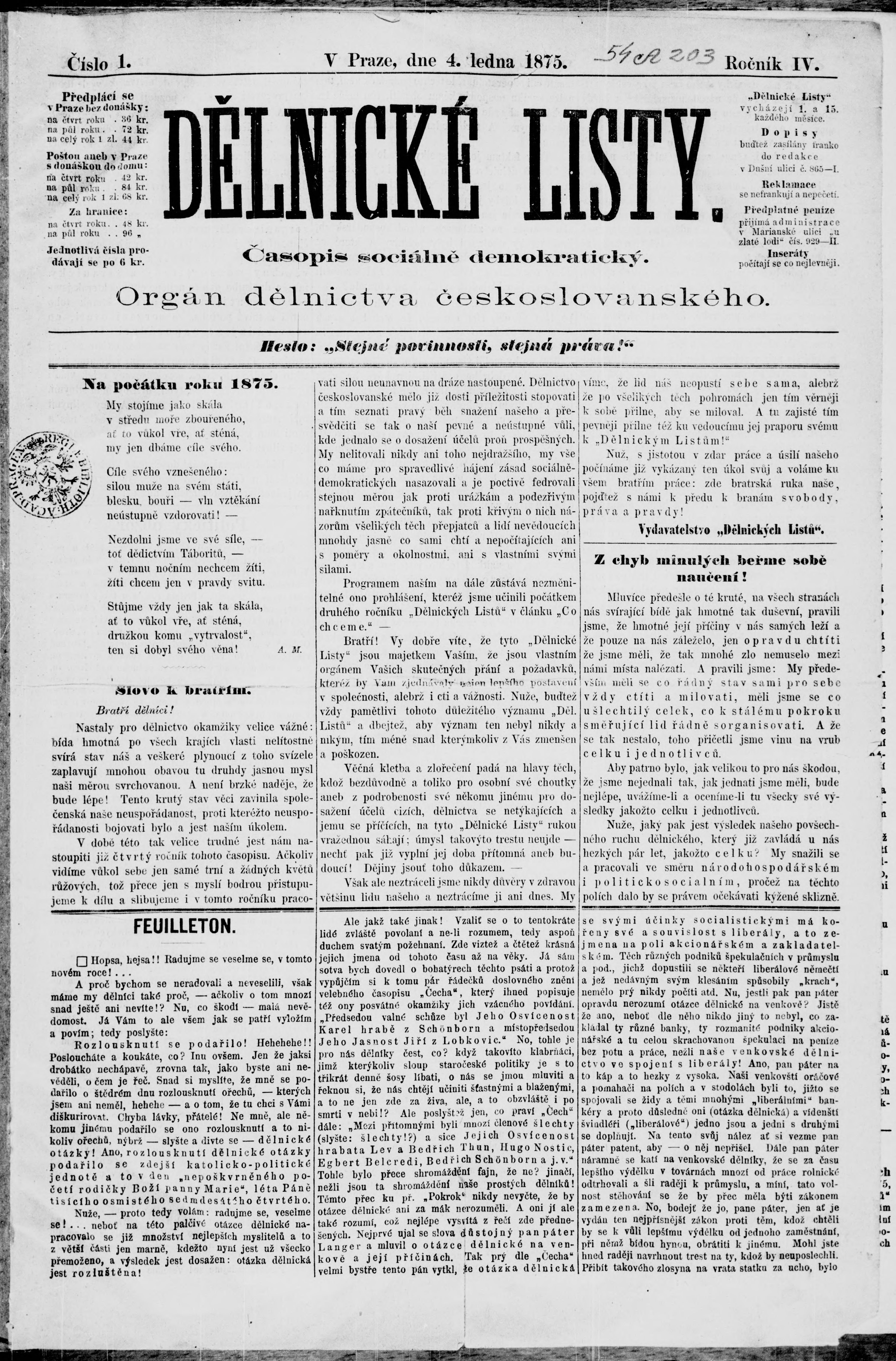 Sozialdemokratische Dělnické listy, Prag, Ausgabe von 4. Januar 1875